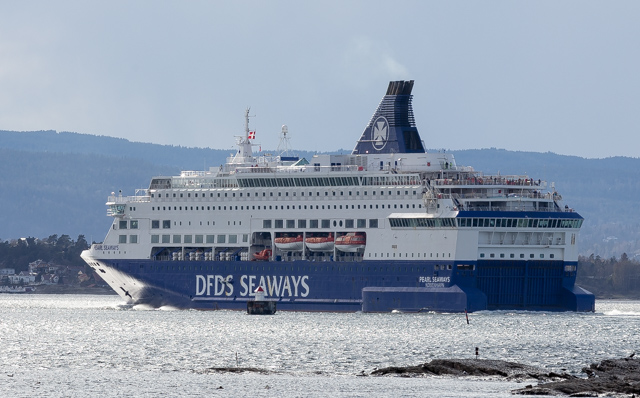 "Pearl Seaways" fra DFDS på vei ut Oslo havn på vei mot København.